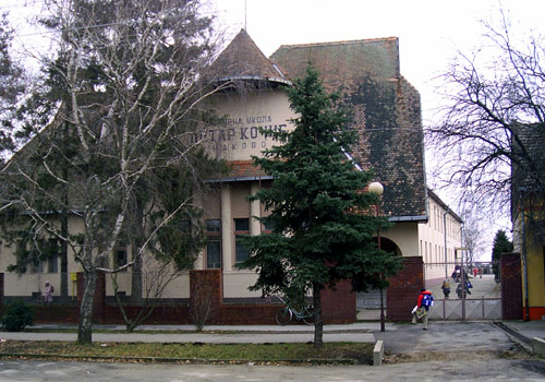 Elementary school Petar Kočić in Nakovo, Vojvodina (Serbia)/L'école élémentaire Petar Kočić à Nakovo en Voïvodine (Serbie)